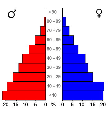 Age pyramids for the 443 municipalities in the Netherlands. Data 2007. Statistics provided by Centraal Bureau voor de Statistiek, Voorburg/Heerlen. Source: Tabel: Bevolking Nederland per gemeente en diverse regio's naar leeftijd, geslacht en burgerlijke staat, 1 januari 1988-2007. Gewijzigd op 24 mei 2007 (on-line database StatLine) Bevolkingspiramide - Gemeente Urk (2007).png